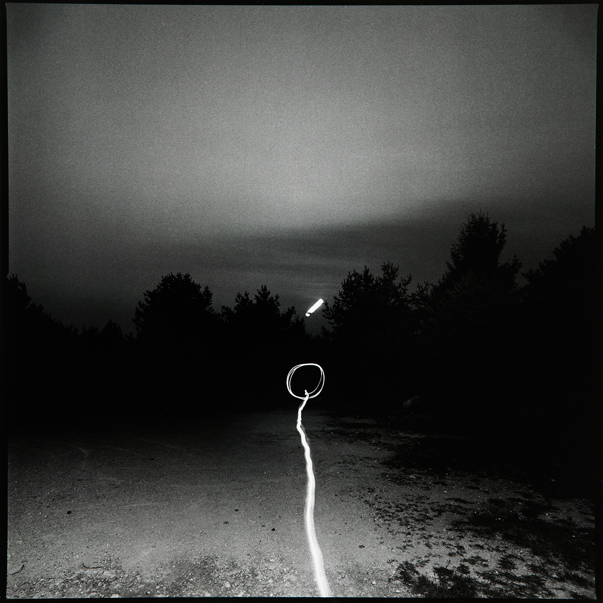 Graffiti greffés #06, 1979, tirage papier argentique vintage 40x 30 cm Grafted graffiti #06, 1979, gelatin silver print, 16 x 12’’, 40 x 30 cm, vintage print